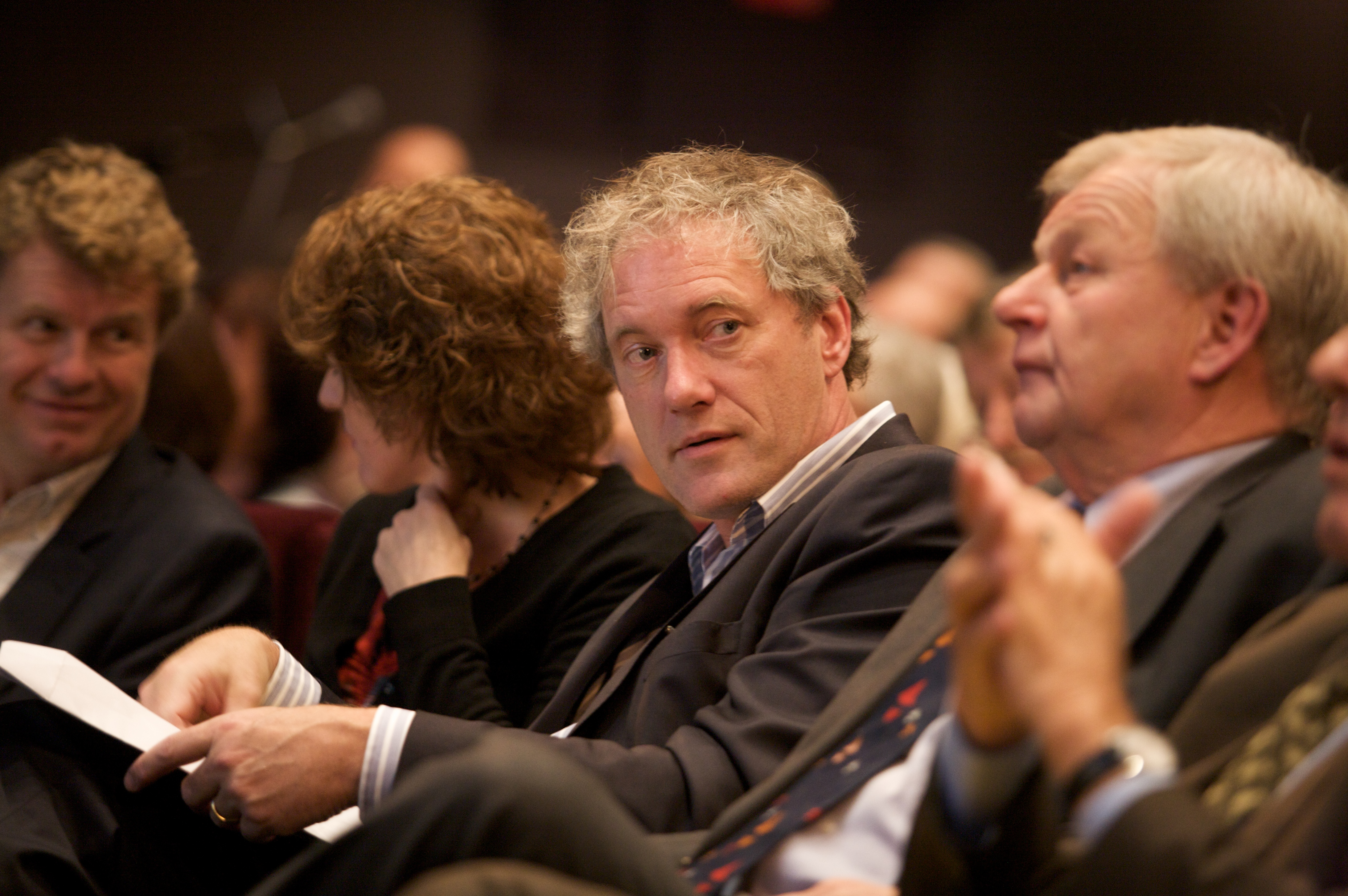 D66 congres 07-11-09 Breda